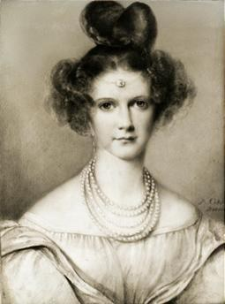 Eliza Radziwiłłówna